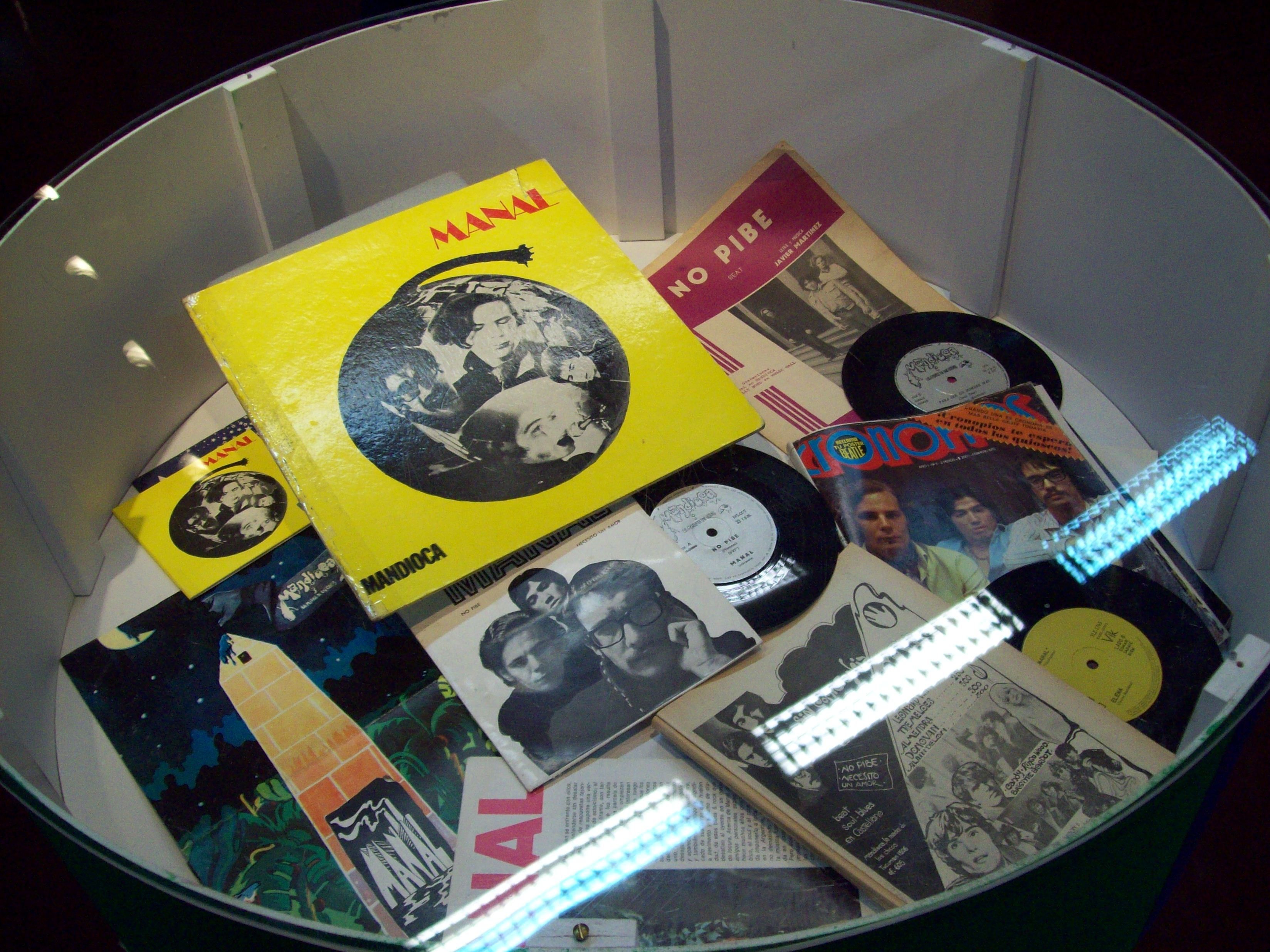 Discos de Manal, editados por Mandioca, sello de Jorge Álvarez, en la muestra de la Biblioteca Nacioal Pidamos peras a Jorge Álvarez.